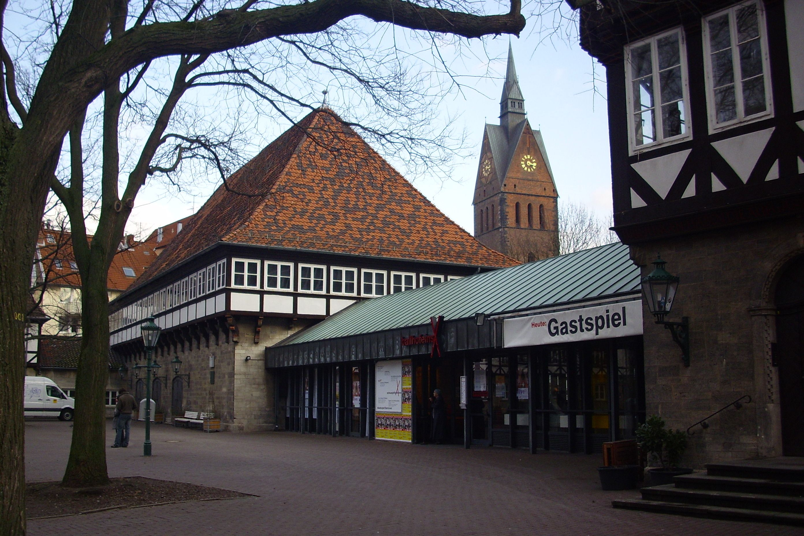 Hannover. Das Theater „Der Ballhof“. Zu sehen ist der Eingang. Die Kirche im Hintergrund ist die Marktkirche.